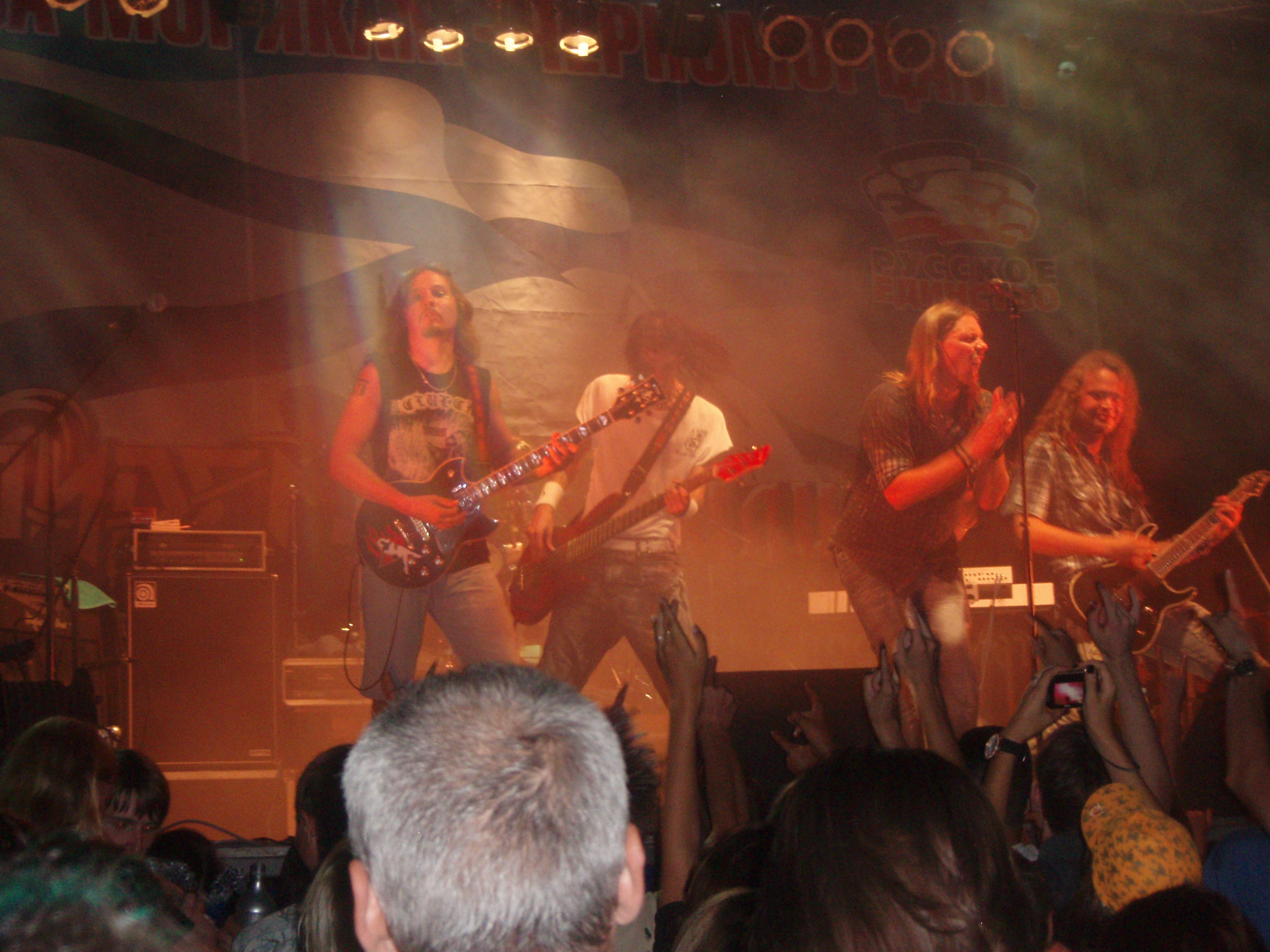 Фотография сделана мною на концерте группы "Эпидемия" 26.07.2010г. Украина, г. Ялта, Набережная. Андрей Смирнов (Everlost) выступил, как сессионный гитарист вместо Юрия Мелисова.